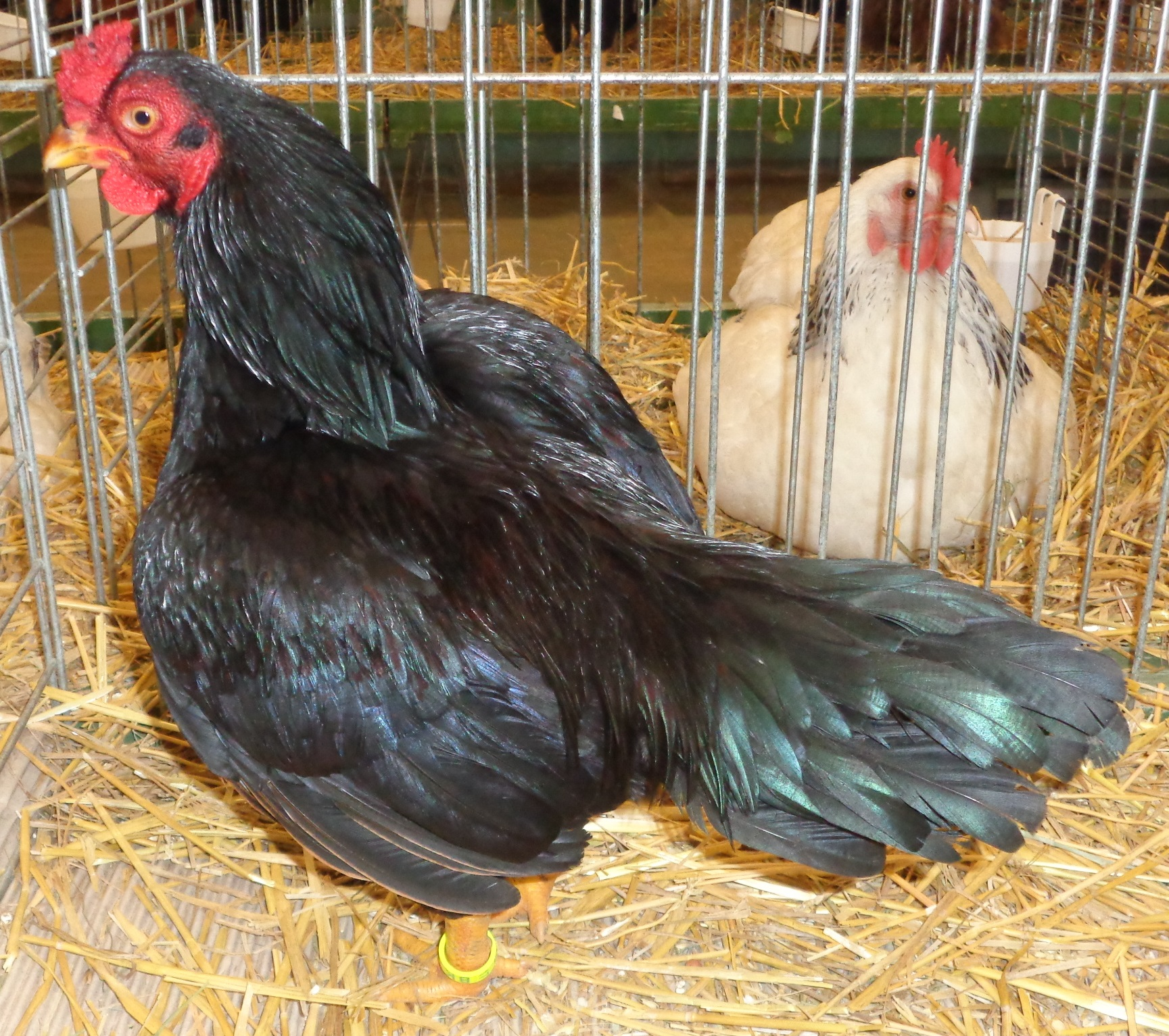 Coq combattant